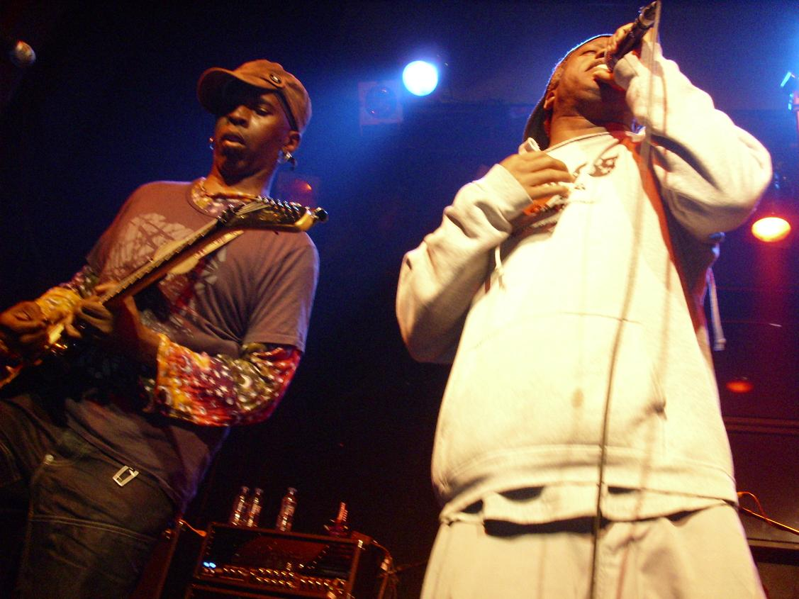 Sala Heineken Madrid , 23 Sept 2008